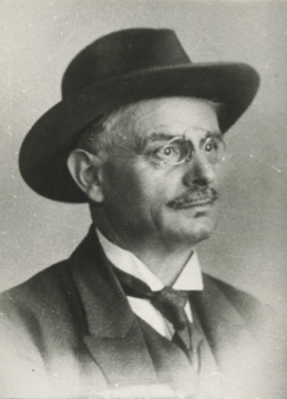 Nikolaus Welter fotografiert von Dr. Praum, Luxemburg, erstellt von Antoinette J. Welter, Enkelin von Nik Welter